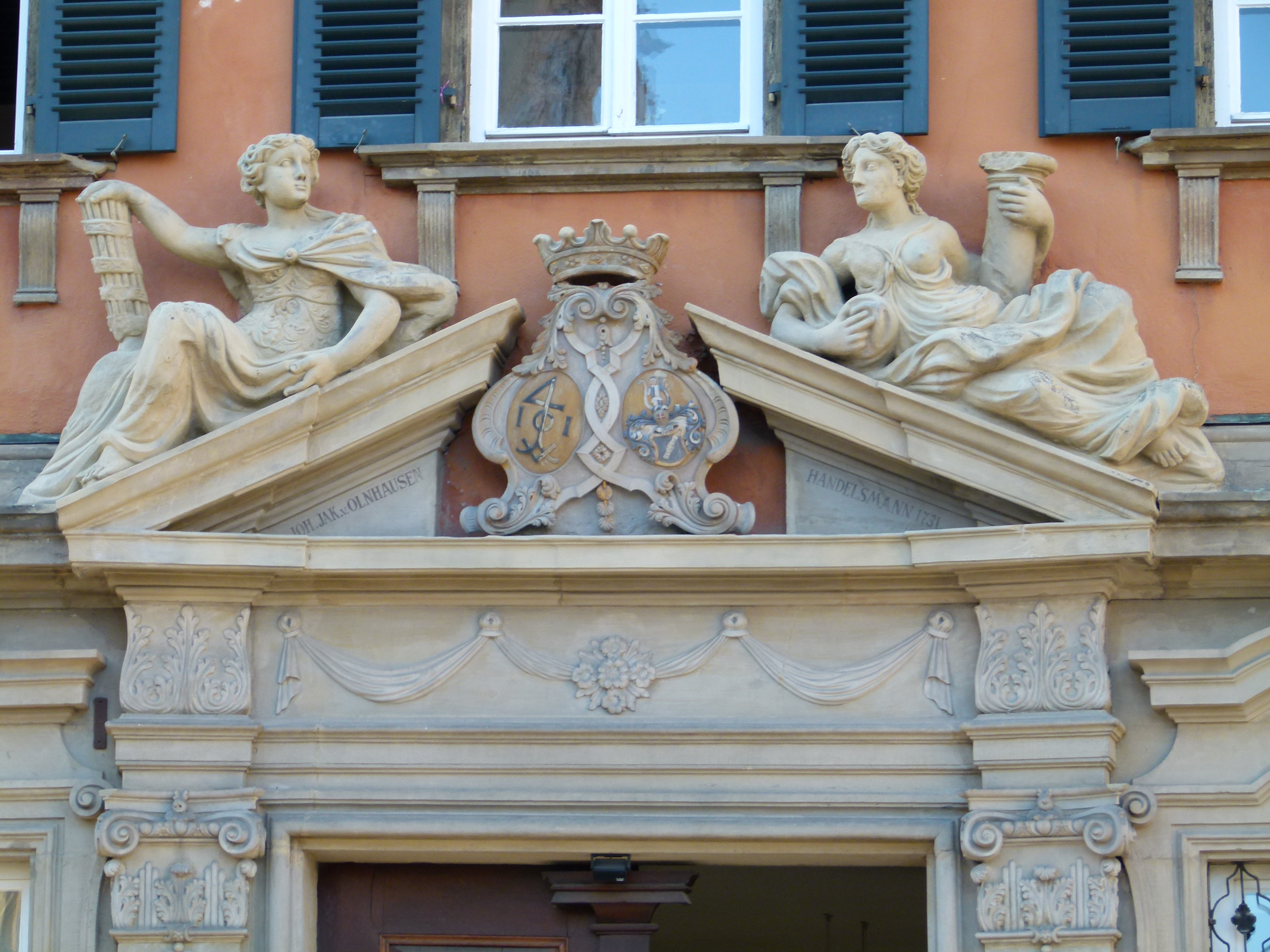 Detail, Denkmalgeschütztes Haus, Am Markt 9-9a, Schwäbisch Hall, mit Wappen Olnhausen (optisch rechts)